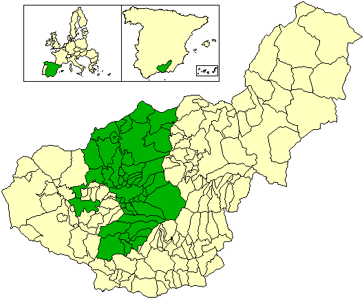 Mapa del partido judicial de Granada, en la provincia de Granada (España)